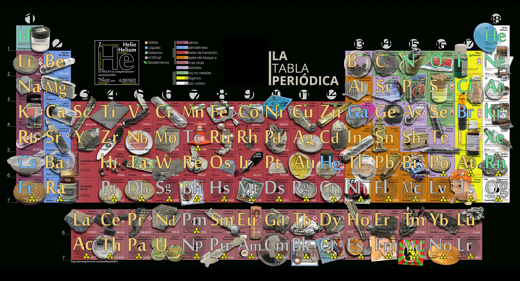 Tabla periódica diseñada con los ejemplares que representan los 118 elementos que la componen. Se incluyen muestras puras, tarjetas, objetos alusivos, compuestos y complementos diversos que ayudan a entender la naturaleza de cada uno de las sustancias químicas.